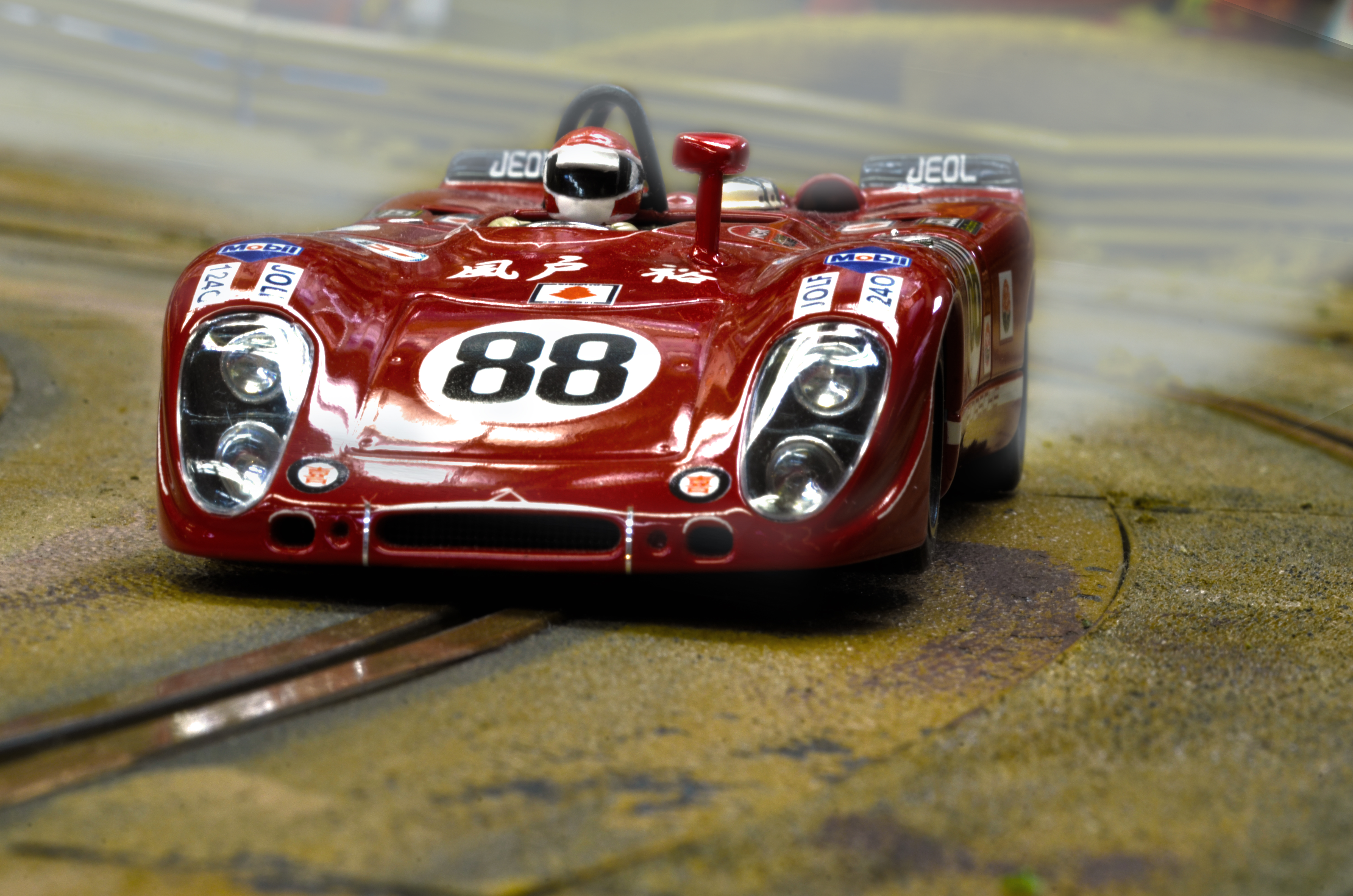 コーナーを通過するポルシェ